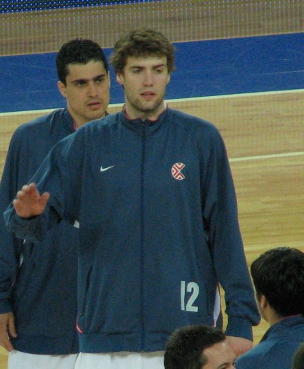 Lukša Andrić